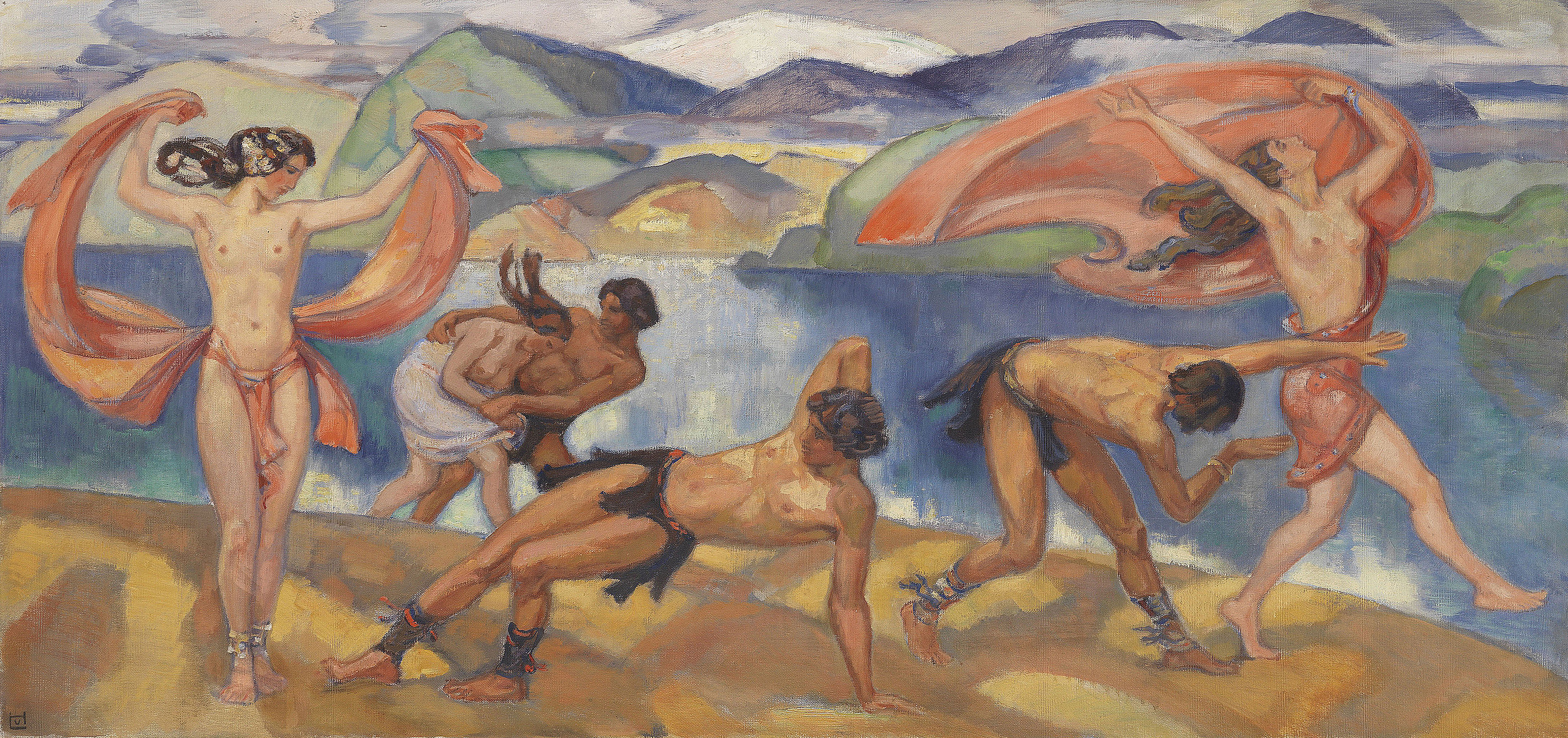 Tanzende in weiter Landschaft. Öl auf Leinwand. Links unten monogrammiert. 70 x 148 cm. Provenienz: Privatsammlung Agnes Hesse, geb. Thiersch, Leipzig (1863-1954). Schwester von Justus Thiersch (1859-1937), der 1888 Maria von Hofmann (geb. 1865) heiratete, die Schwester des Künstlers. Danach in Familienbesitz Leipzig/Saarbrücken/NRW (verso mit dem Besitzer-Etikett von Prof. Dr. med. Fritz Hesse (1897-1980), Sohn der Vorgenannten).